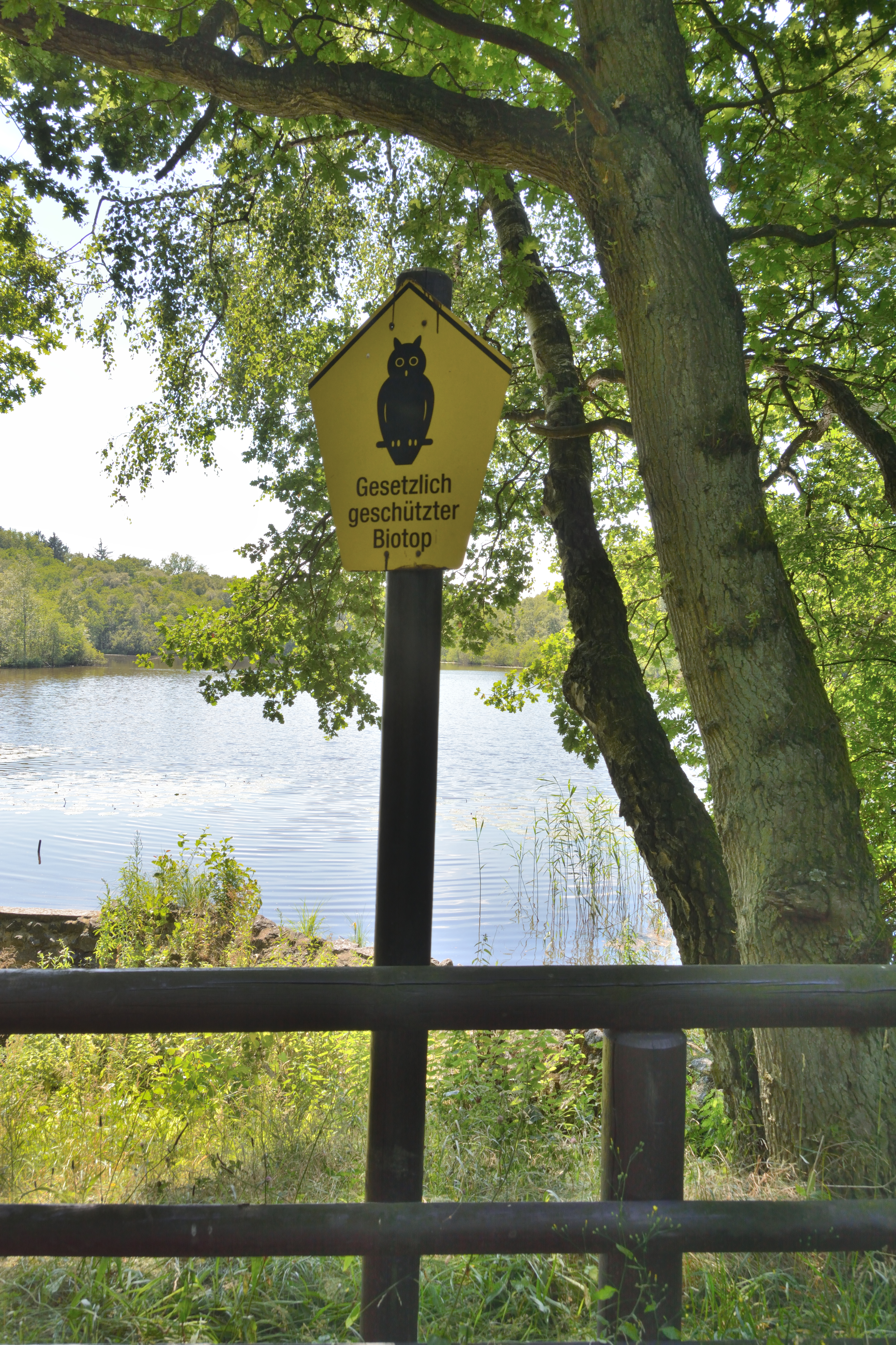 Der Kreis Steinburg hat mehrere Flächen unter dem gemeinsamen Namen "Landschaftsbestandteile und Landschaftsteile im Bereich mehrerer Gemeinden" zusammengefasst. Dieses Foto wurde am „Stormsteich und Umgebung“ in Itzehoe aufgenommen, es ist das Teilstück Nr. 5. – Schild „Gesetzlich geschützter Biotop“.